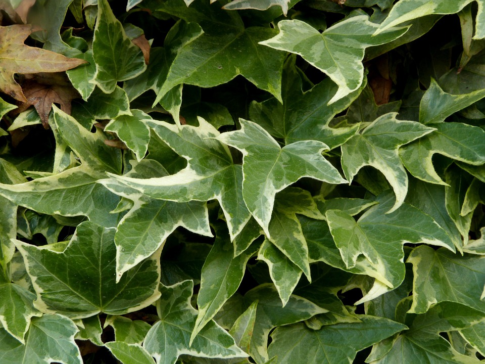 Κίσσός